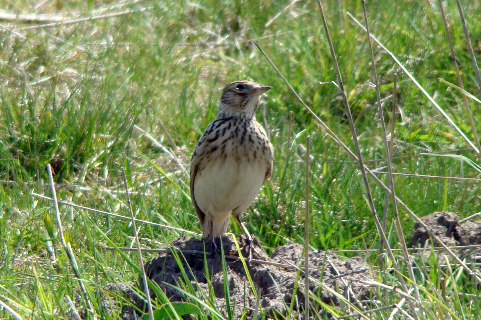 Feldlerche [Alauda arvensis] von vorne gesehen